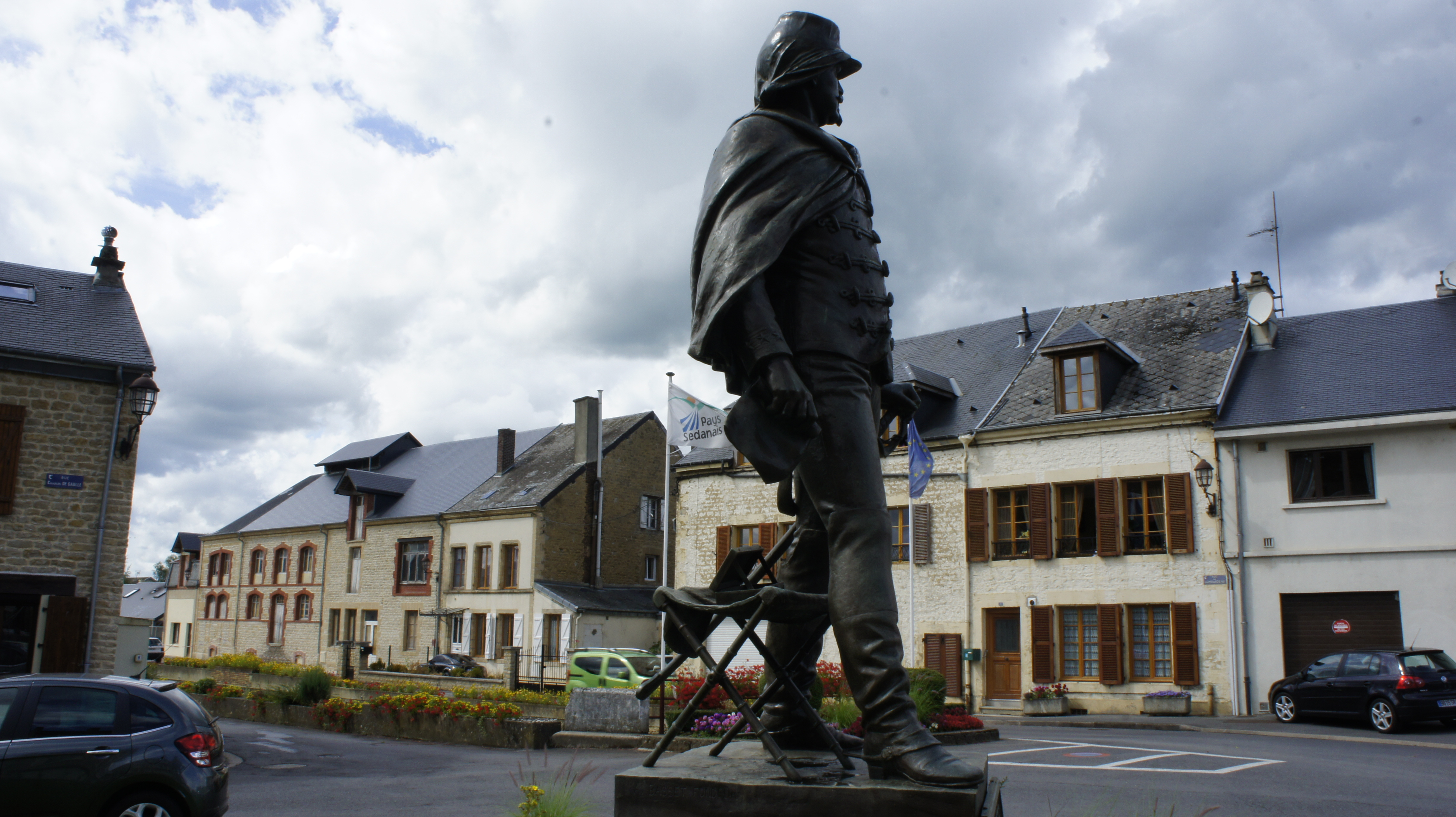 La statue du général Margueritte_et_en arrière plan le cours d'eau le_Lombardeau_.